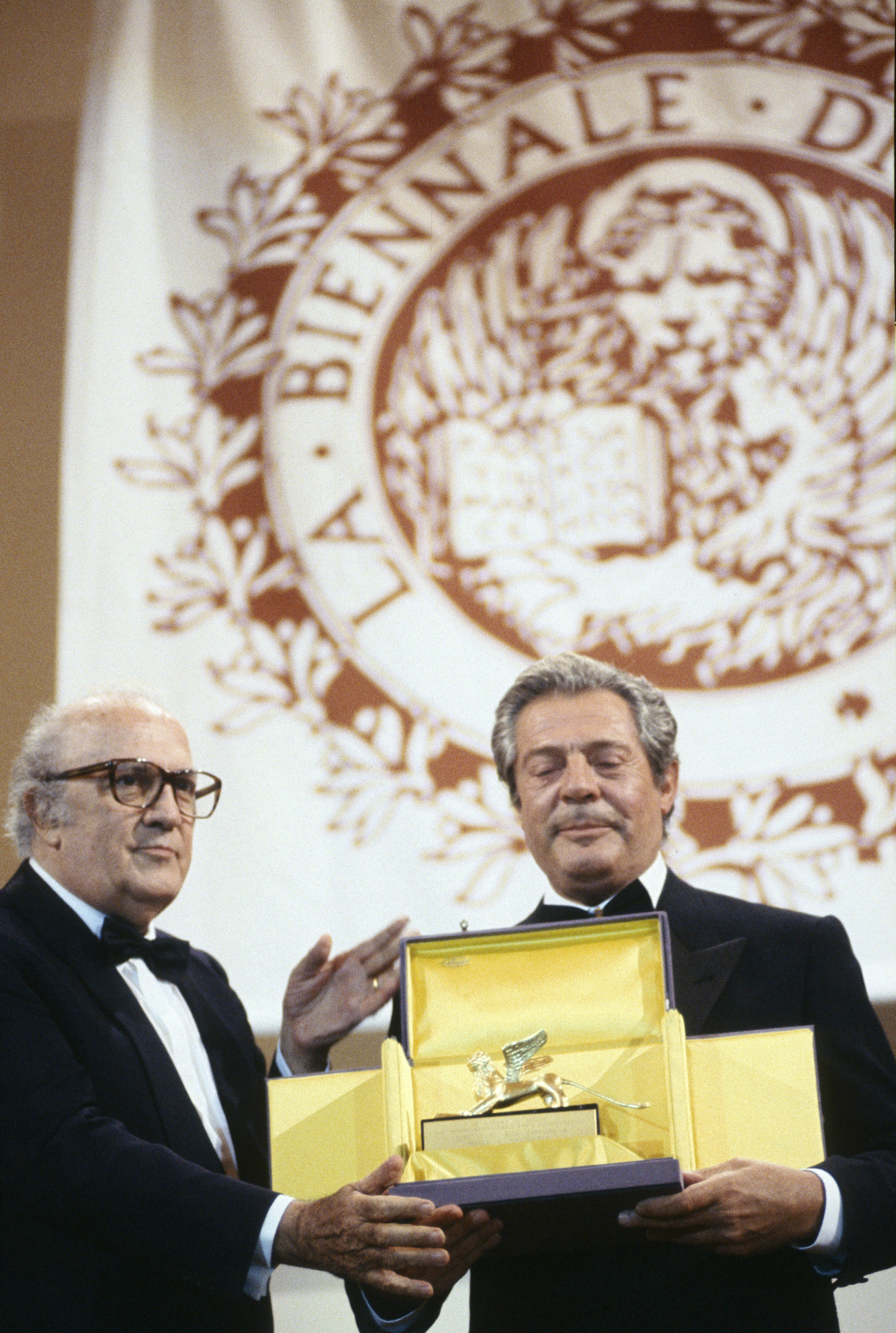 federico fellini consegna a marcello mastroianni il leone d'oro alla carriera durante la Mostra del cinema di Venezia del 1990